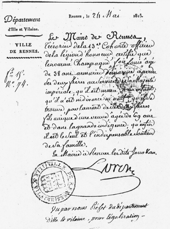 Certificat du maire de Rennes de l'état de soutien de famille d'un armurier de marine en mai 1815. Texte : Rennes, le 24 mai 1815. Le Maire de Rennes, trésorier de la 13e cohorte officier de la légion d’honneur certifie, que le nommé Champagne Fois. Louis âgé de 38 ans armurier de marine a perdu deux frères au service de sa Majesté impériale, qu'il est marié, a un enfant, qu'il n'est ni divorcé ni veuf, qu'il se trouve par la mort de ses deux frères, fils unique de d'une veuve âgée de 69 ans et d'une grande indigence, qu'enfin il est le seul et indispensable soutien de sa famille. En mairie à Rennes lesdits jour et an. Lorin Vu par nous préfet du département d'ille et vilaine, pour légalisation.